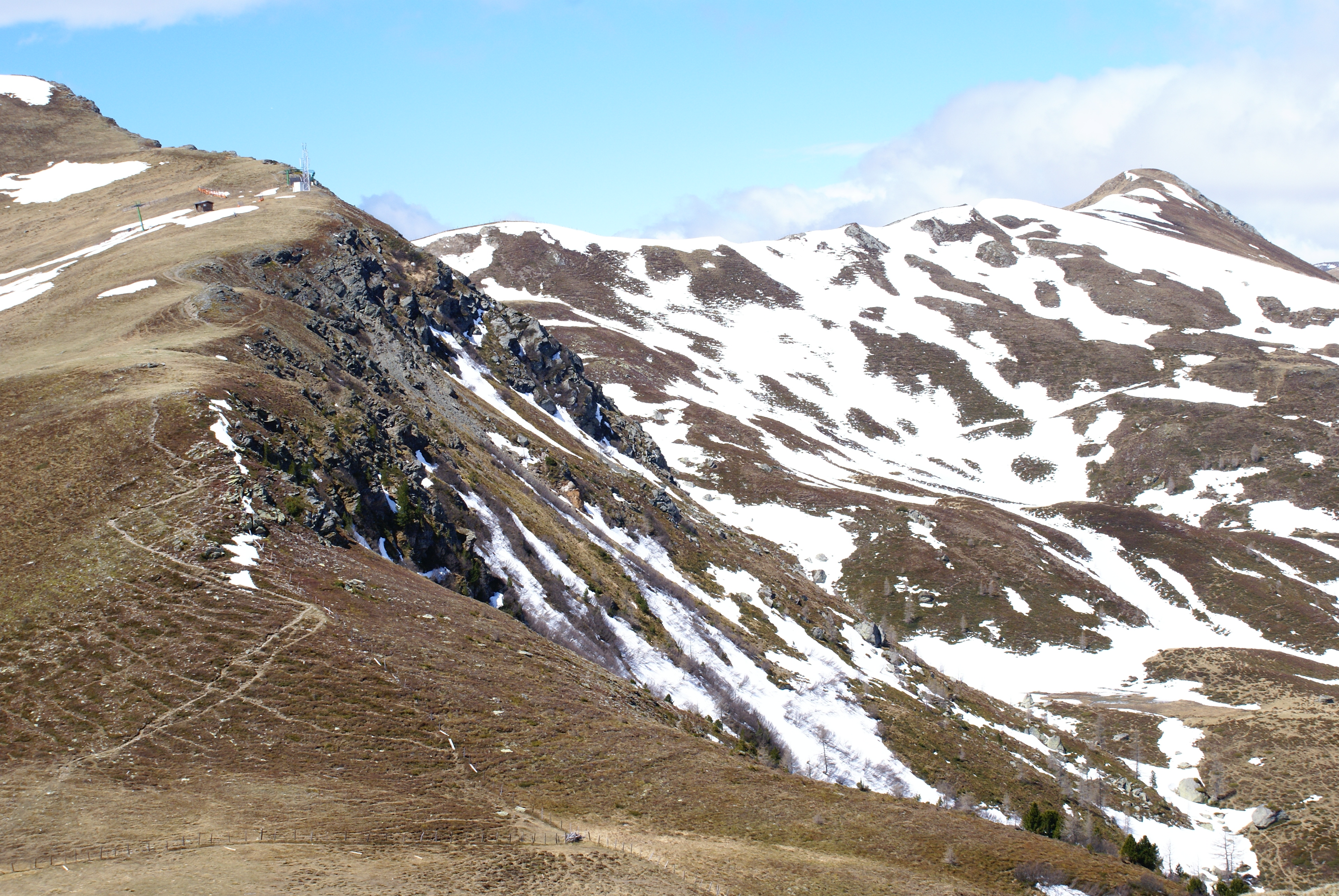 Falkertalm mit Falkertköpfl